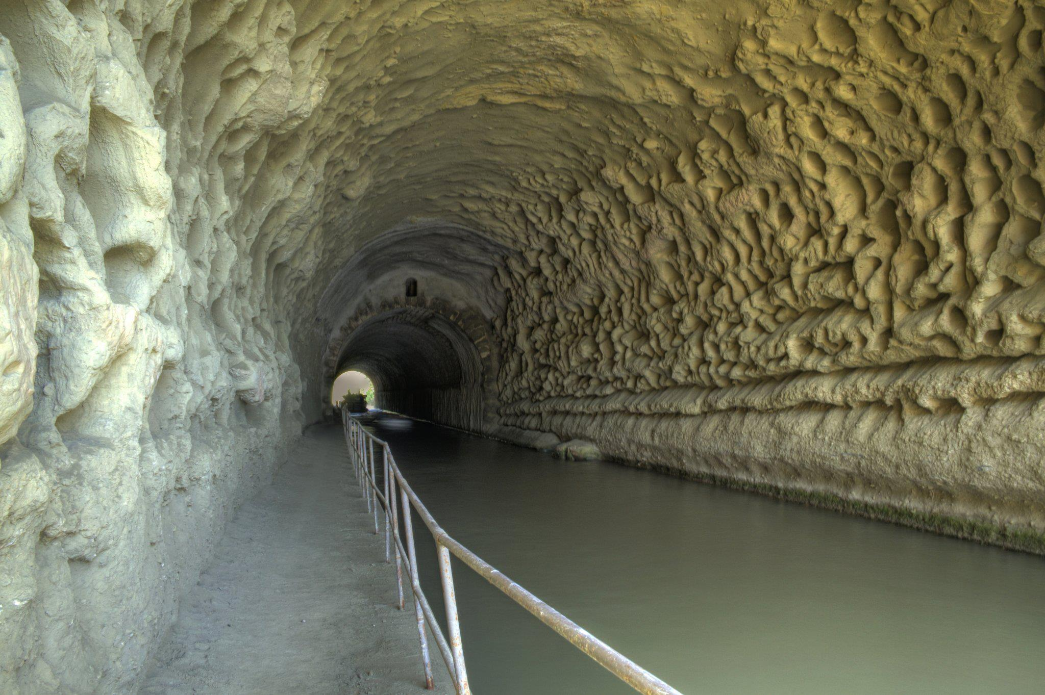 Intérieur du tunnel de Malpas, dans l'Hérault (France) It is indexed in the Base Mérimée, a database of architectural heritage maintained by the French Ministry of Culture, under the references PA34000063 and PA34000062 .